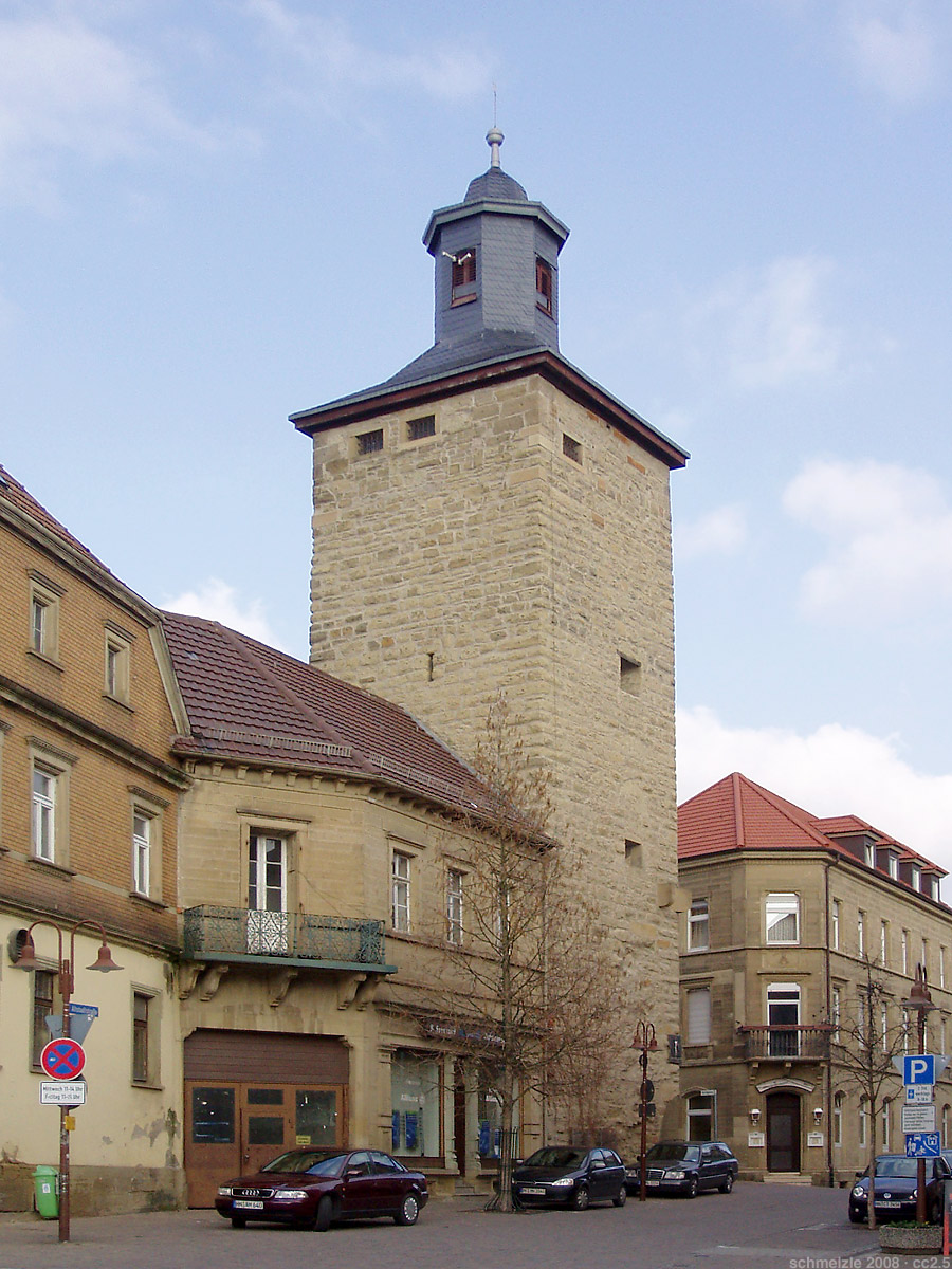 Pfeifferturm in Eppingen, Wahrzeichen der Stadt